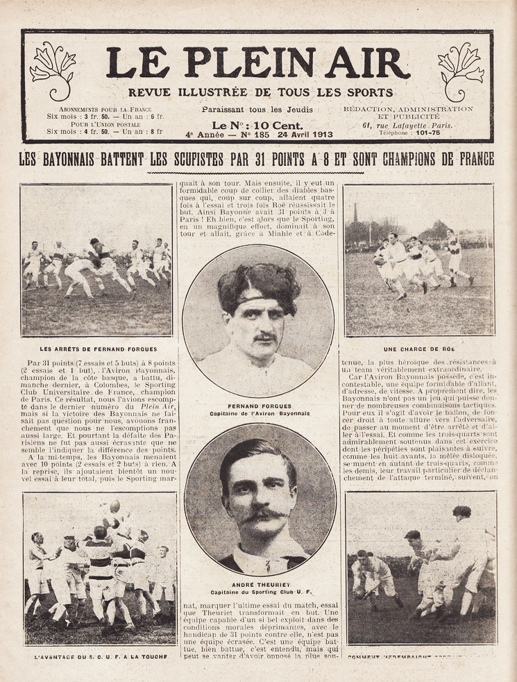 Le Plein Air, Revue illustrée de tous les sports, 24 April 1913 (French language magazine)